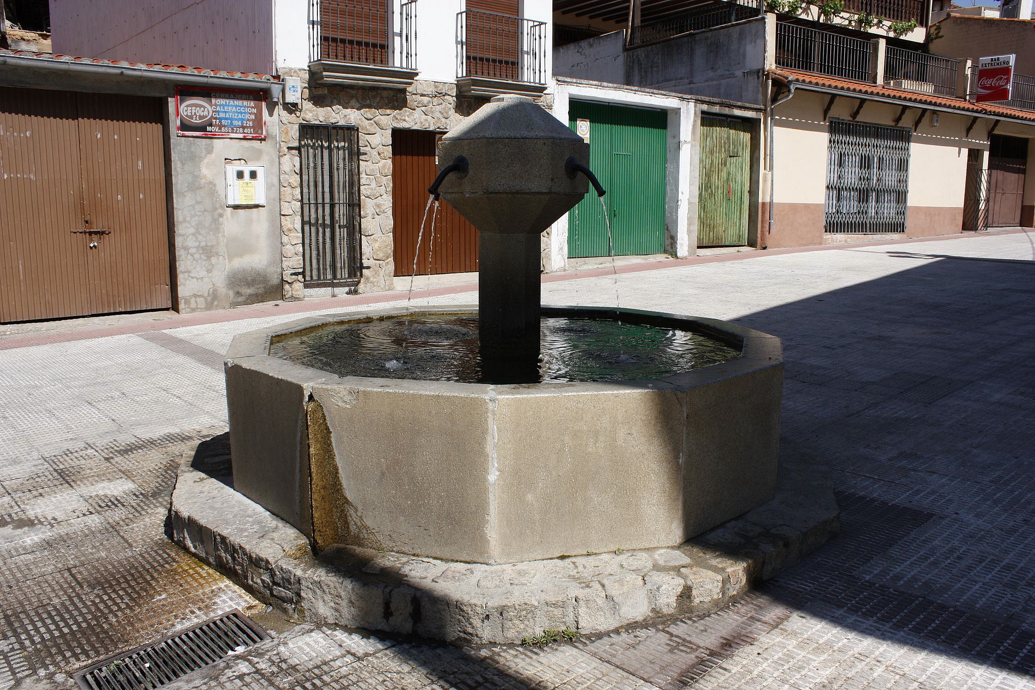 Fuente en Pasarón de la Vera, provincia de Cáceres, España